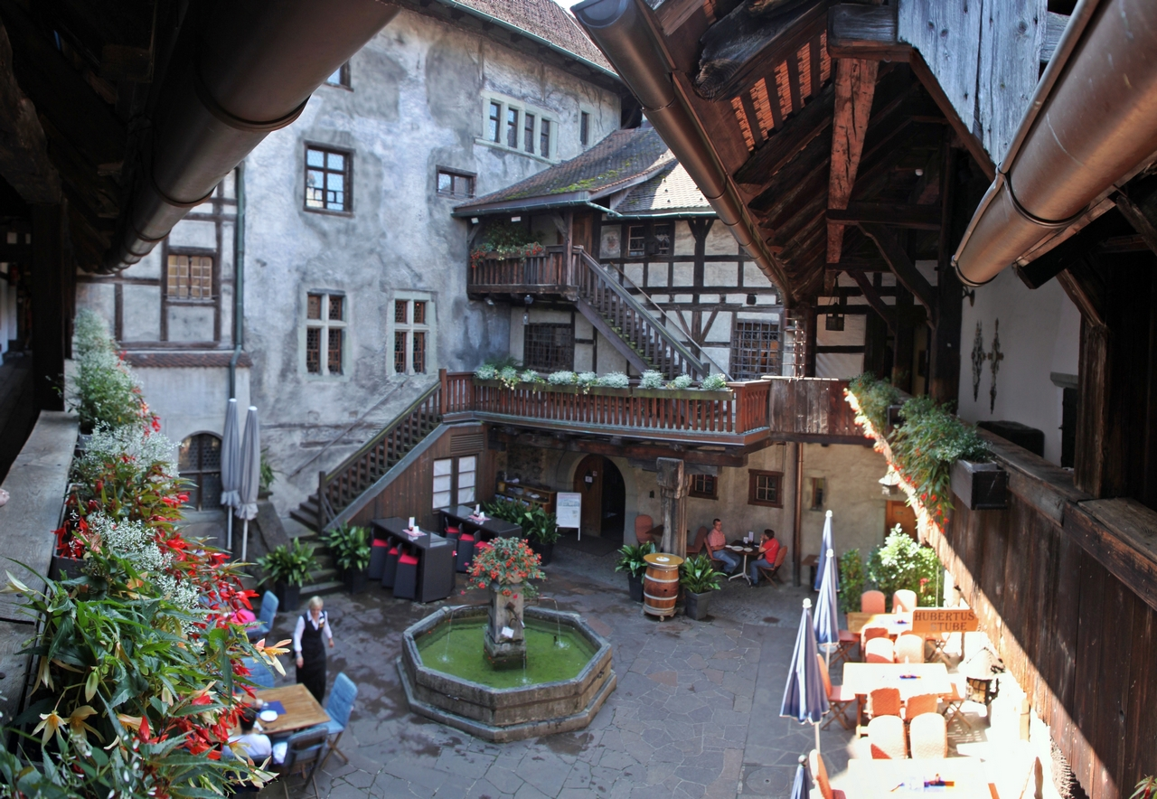 Feldkirch (Vorarlberg): Blick in den Innenhof der Schattenburg.